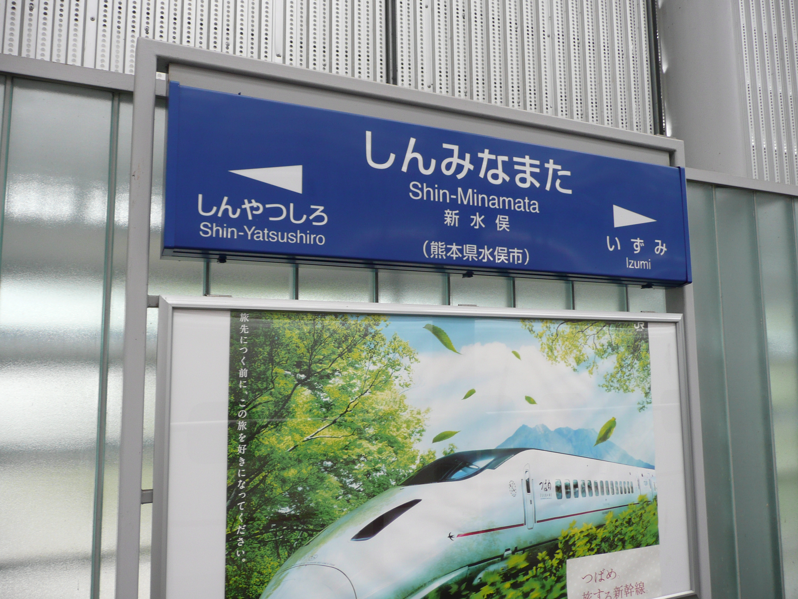 新水俣駅の看板